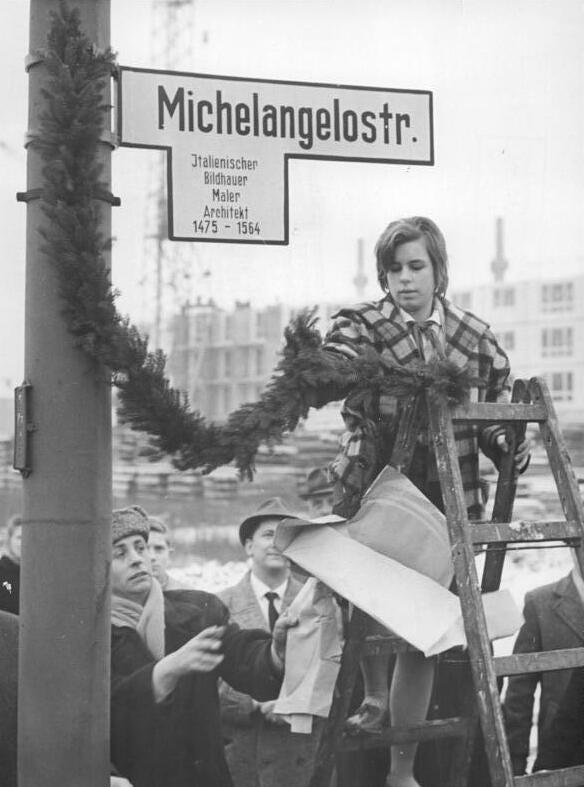 Berlin, Namensgebung Michelangelostraße Zentralbild Junge 18.2.1964 Berliner Straße erhielt den Namen Michelangelo. Zu Ehren des 400. Todestages des großen italienischen Bildhauers, Malers und Architekten Michelangelo wurde am 18.2.1964 die Verlängerte Ostseestraße im Norden der Hauptstadt der DDR in Michelangelostraße umbenannt. UBz: In Anwesenheit zahlreicher Ehrengäste enthüllte ein Junger Pionier das neue Strassenschild und schmückte es mit Girlanden.